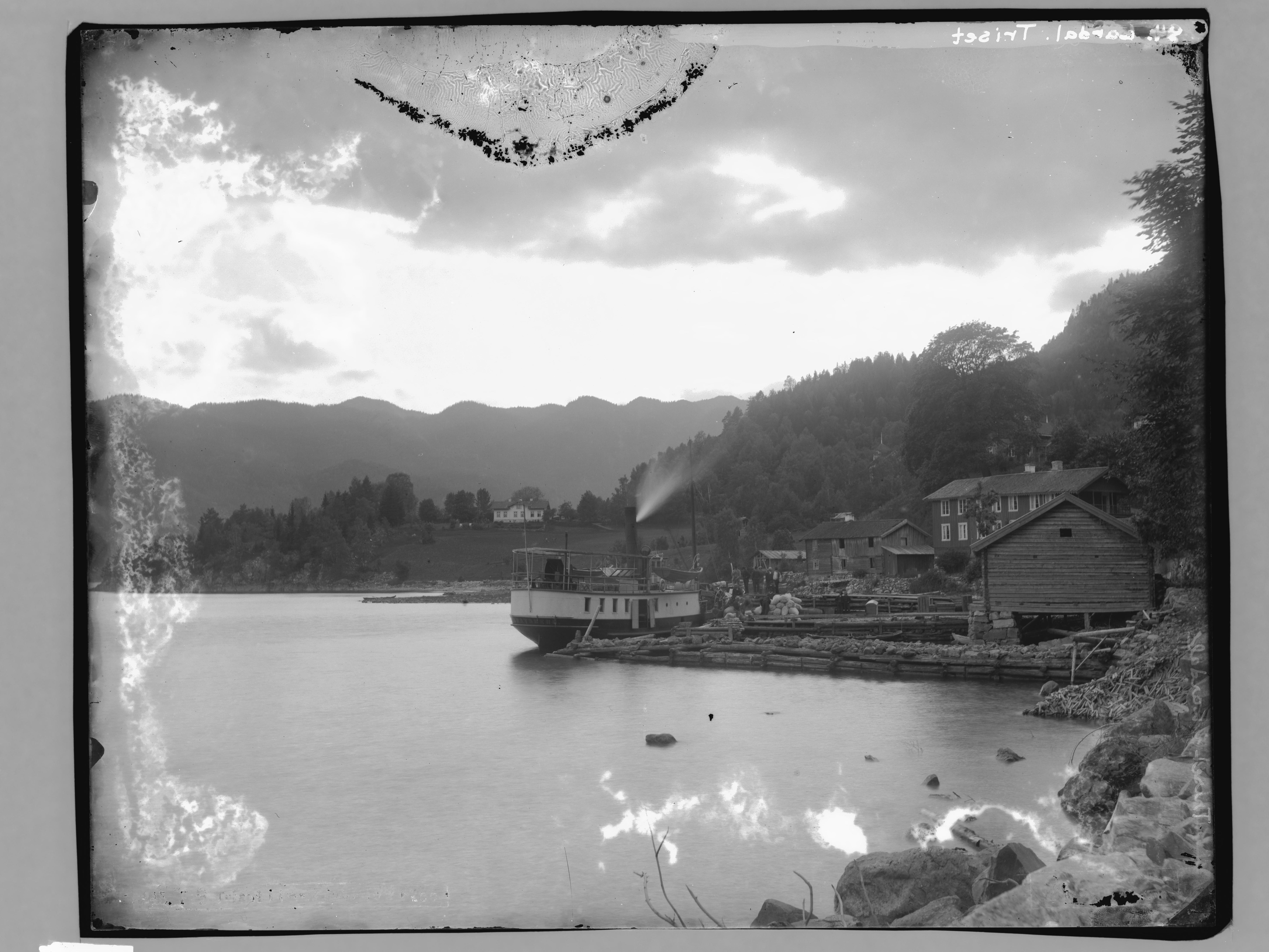 Påskrift negativ: Triset i Lardal [Riksantikvaren] Påskrift konvolutt: B-176 Lårdal. Triset. Oversikt [Riksantikvaren] Sted: Bandak,Lårdal,Triset Kommune: Tokke Fylke: Telemark Tagger: landskap vann(innsjø) Bratsberg(dampbåt) tettsted